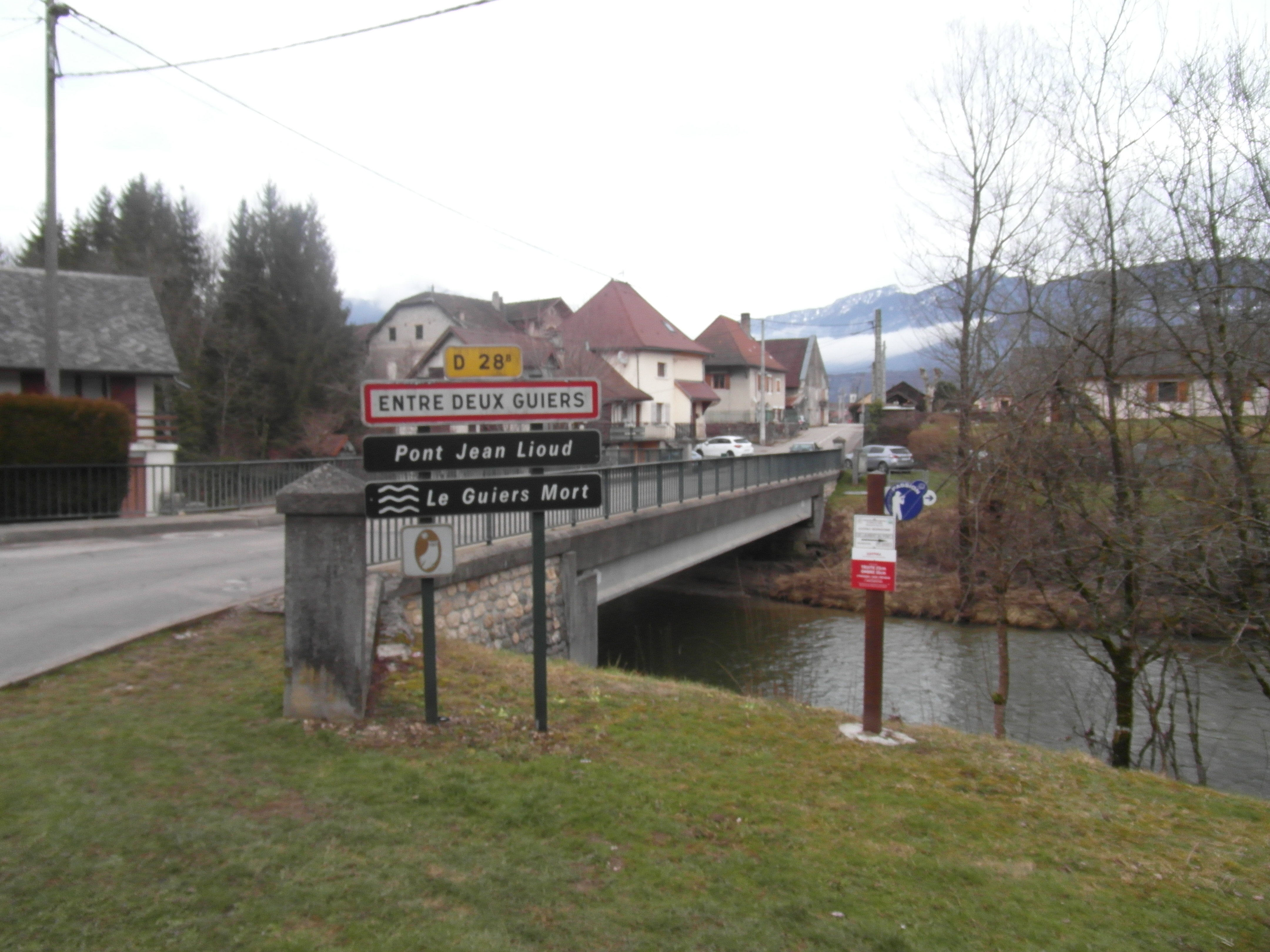 Entrée de la ville d'Entre-deux-Guiers